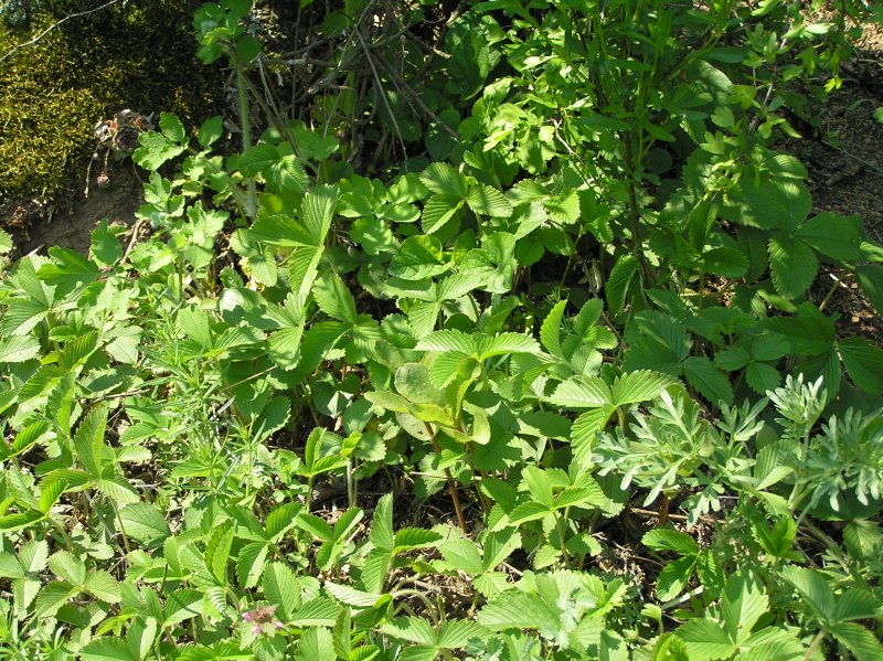 Рослинний світ Гранітно-Степового Побужжя